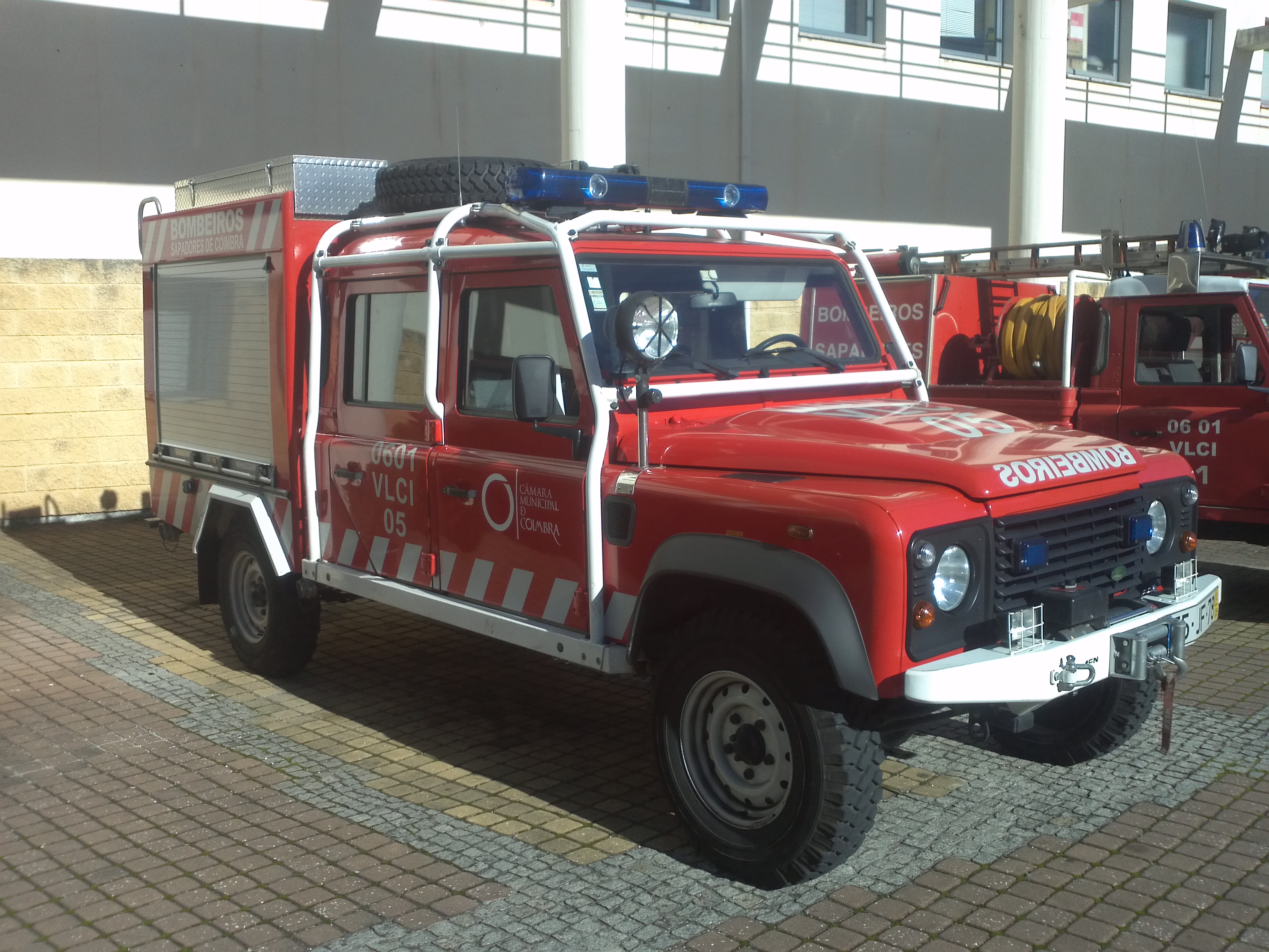 Veiculo Ligeiro de Combate a Incêndios 05